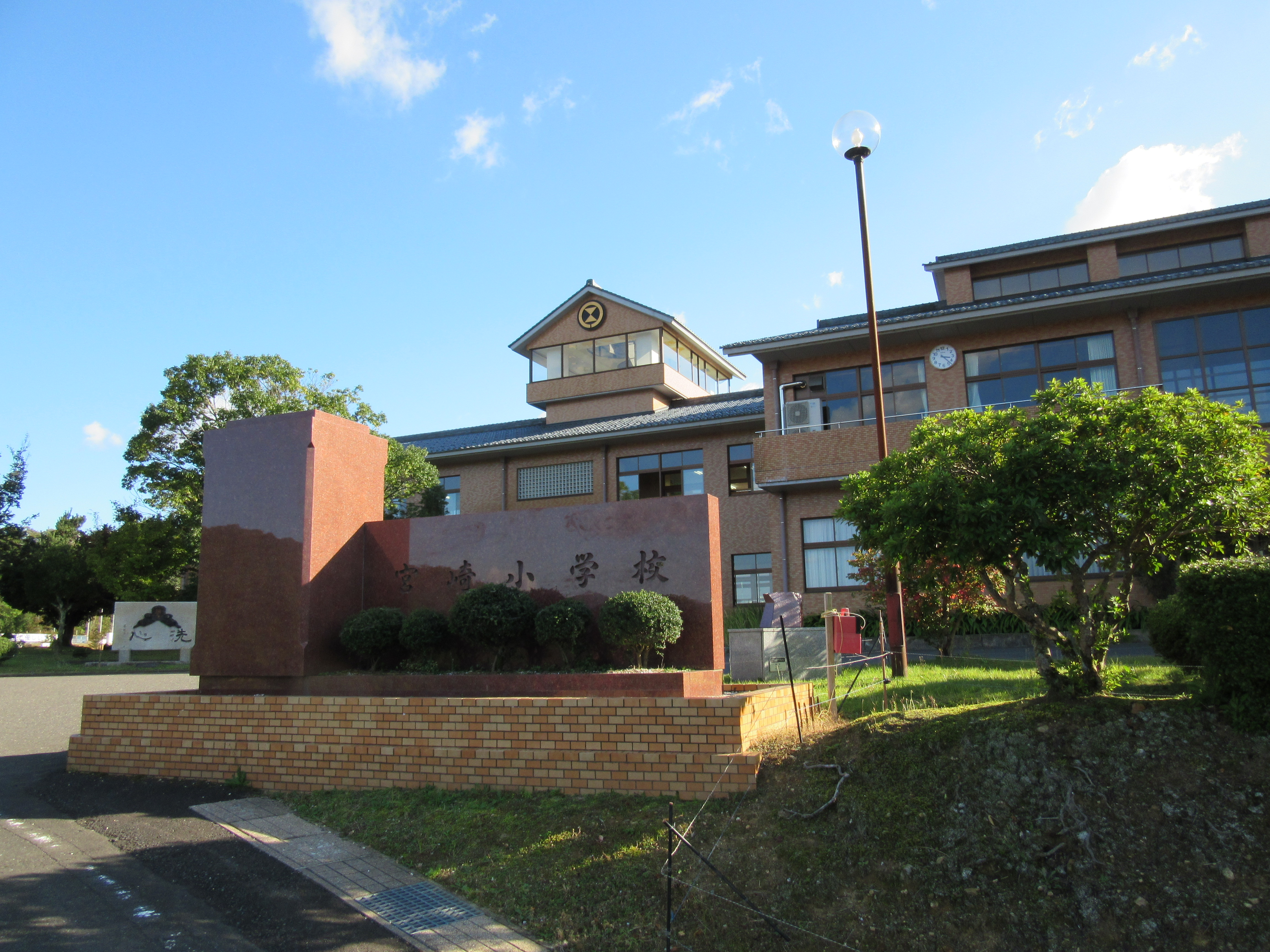 宮崎小学校